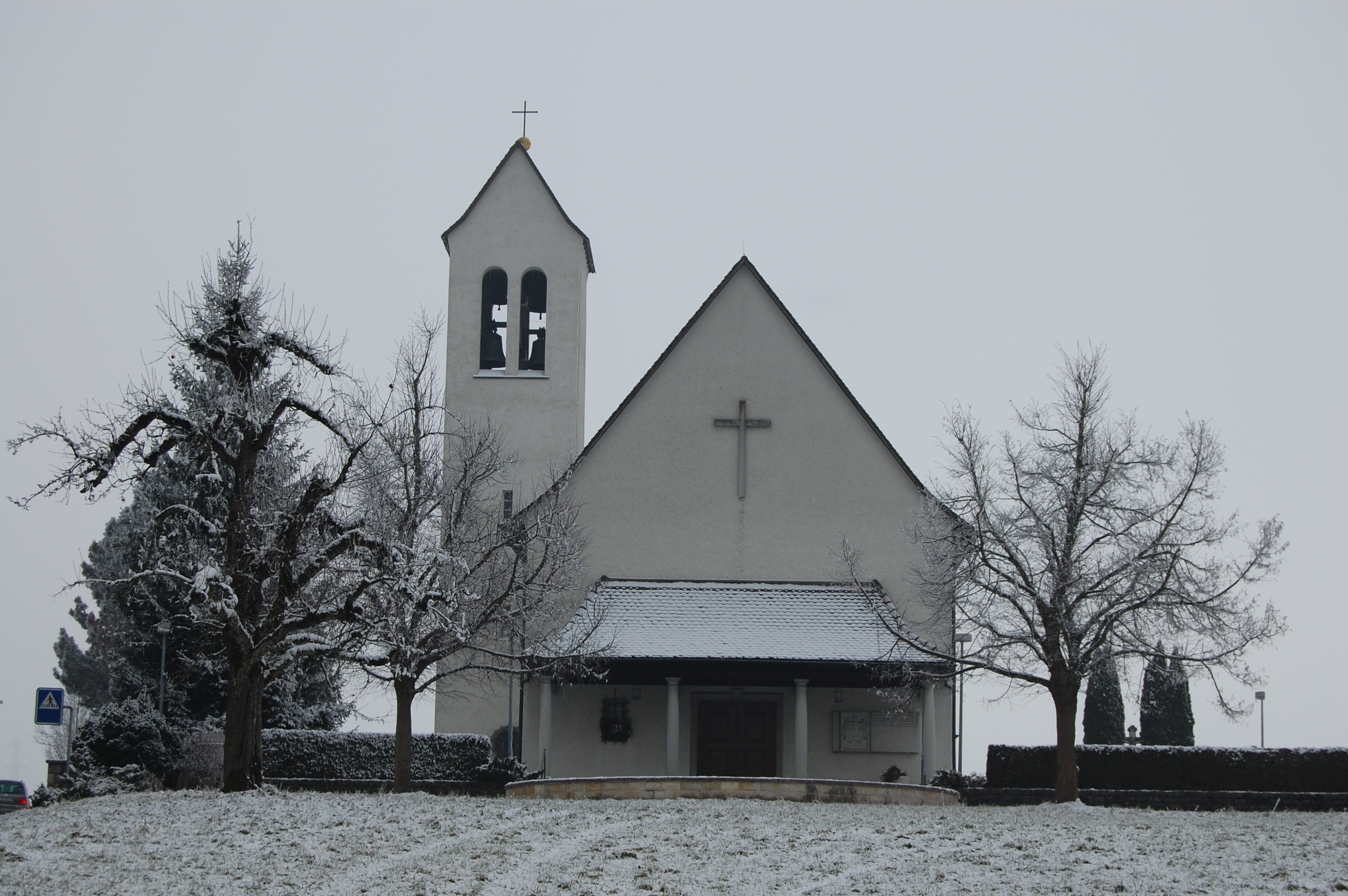 Röm.-kath. Kirche Sankt Urs und Viktor in Subingen wurde in den Jahren von 1680 bis 1684 erbaut.